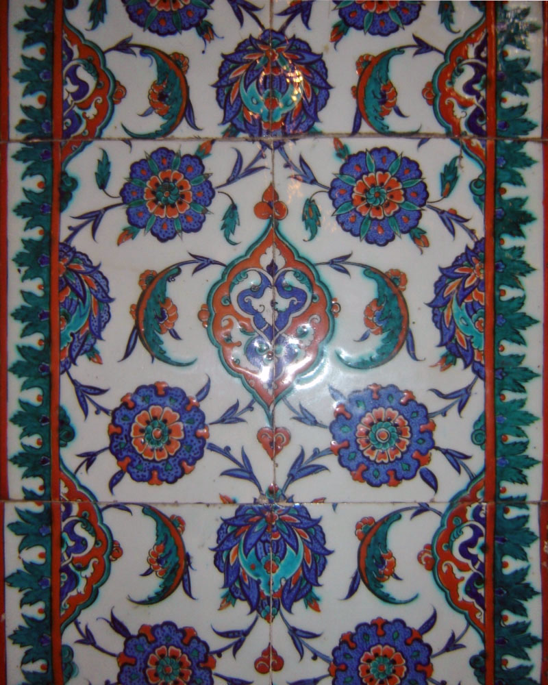 Iznik tiles inside Selimiye Mosque, Edirne, Turkey